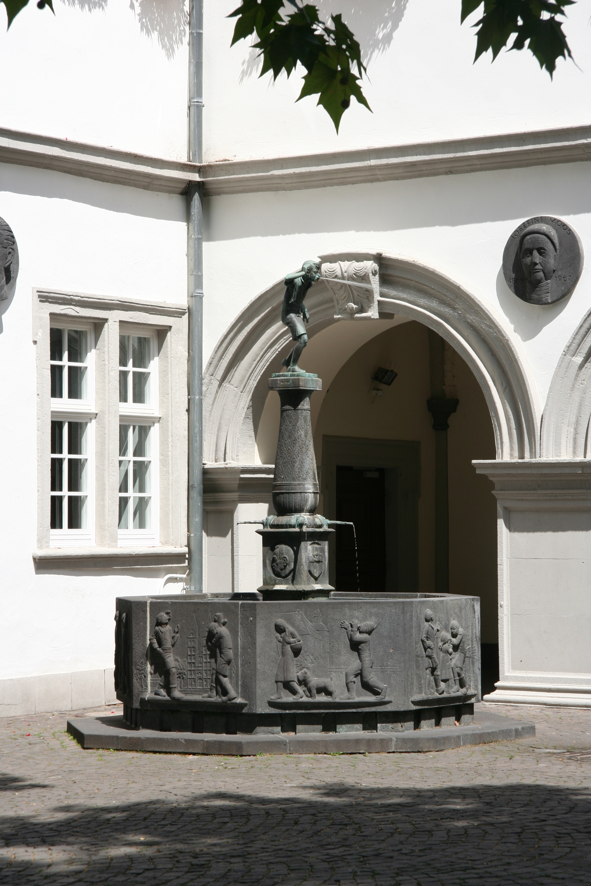 Schängelbrunnen in Koblenz